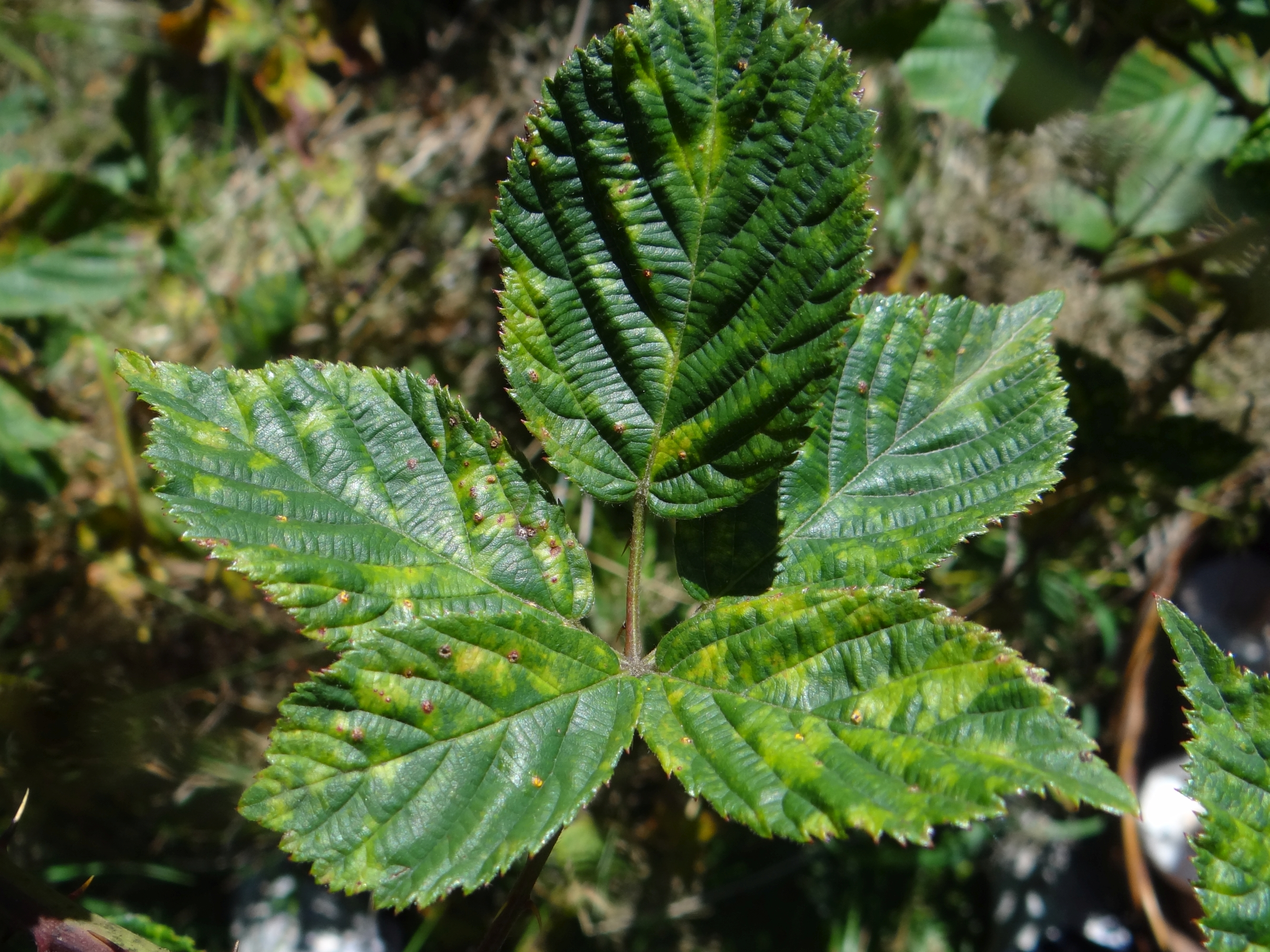 Phragmidium rubi-idaei. Location: Poland, Trzciana, województwo małopolskie